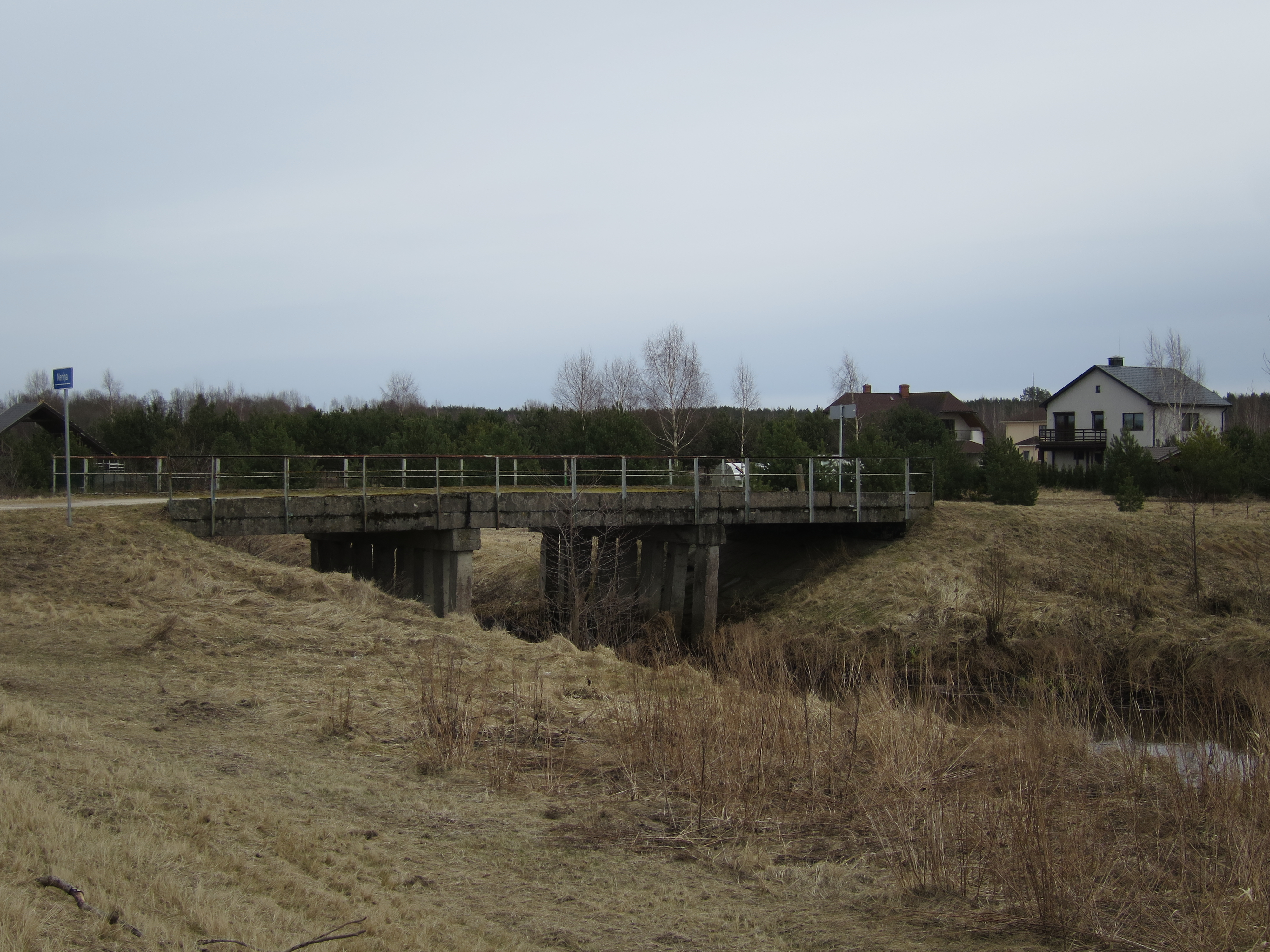 Neriņas tilts pie Vīkuļiem